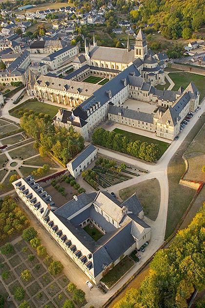 Vue aérienne oblique du l'Abbaye Royale de Fontevraud.